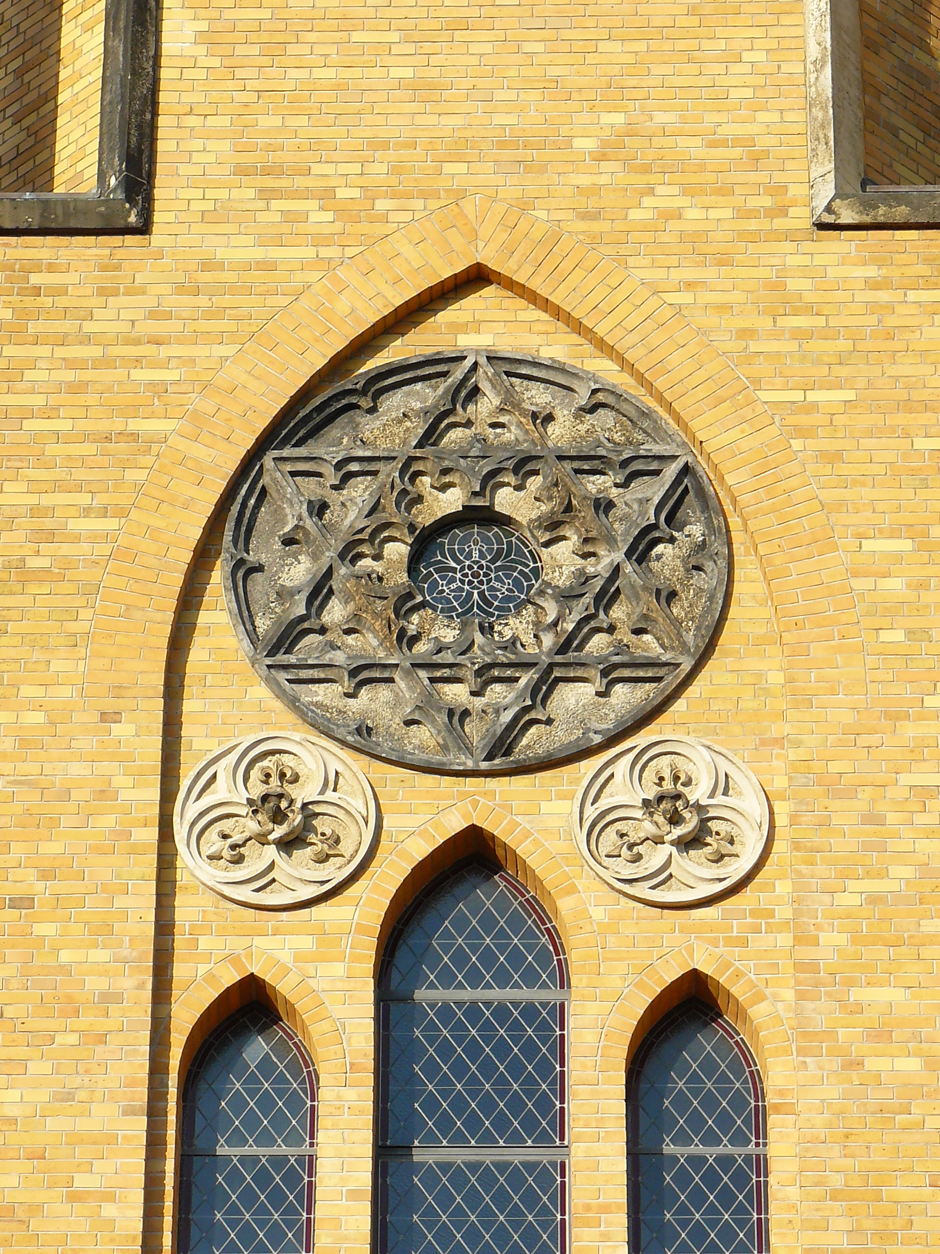 Turm der neogotischen Friedenskirche in Leipzig Gohlis; gotische Fenster und Sechsstern